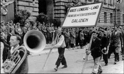 Парад рекрутів дивізії «Галичина» у Львові 18 липня 1943 року